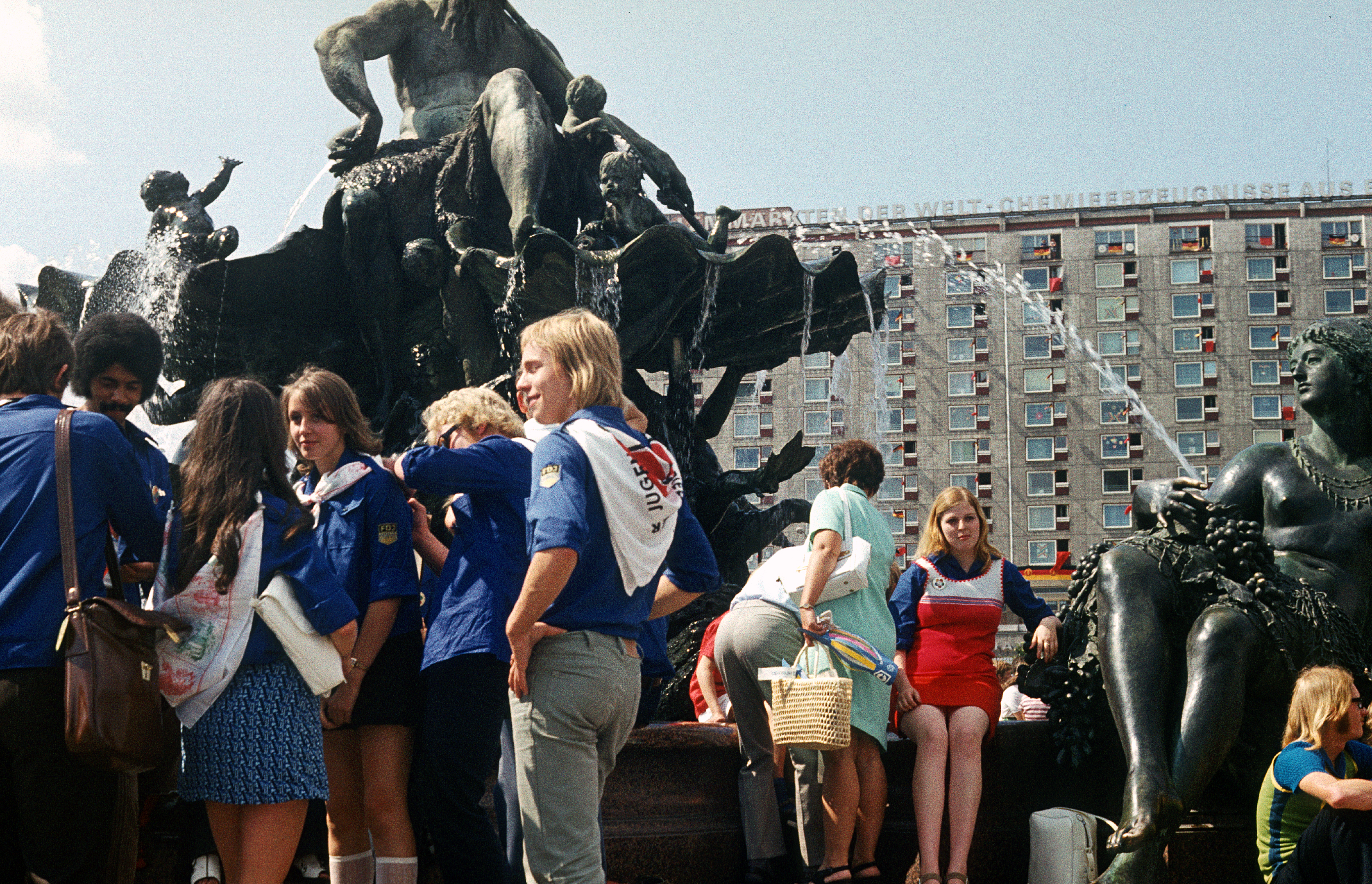 Weltfestspiele der Jugend und Studenten, Berlin 1973, Neptunbrunnen